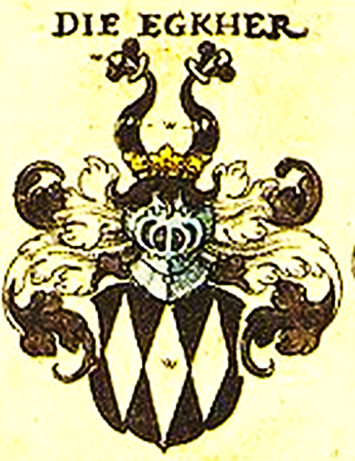 Wappen der Eckher (Ecker) von Kapfing